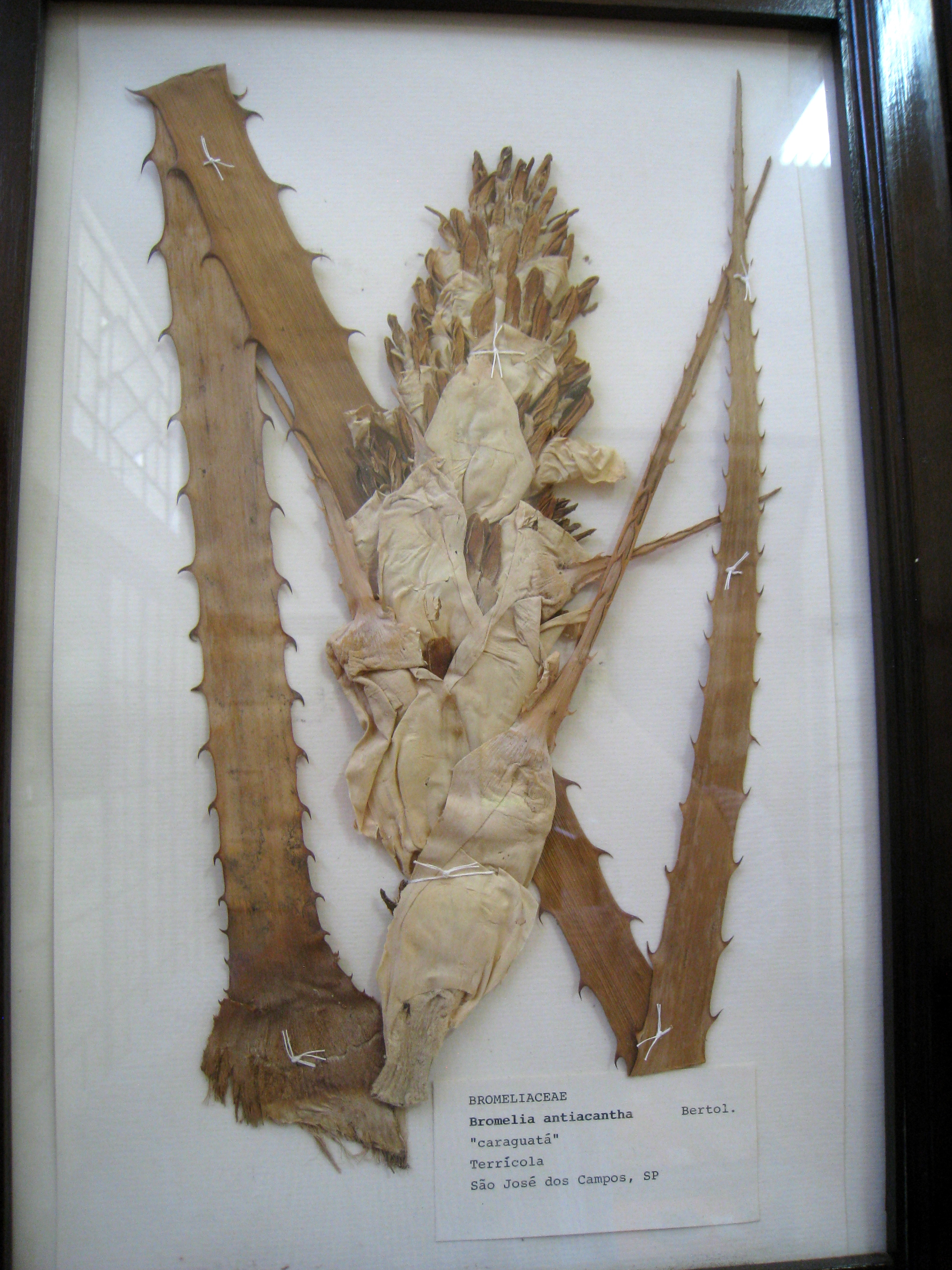 Bromelia antiacantha specimen in the Museu Botânico Dr. João Barbosa Rodrigues, Jardim Botânico de São Paulo, São Paulo City, SP, Brazil.